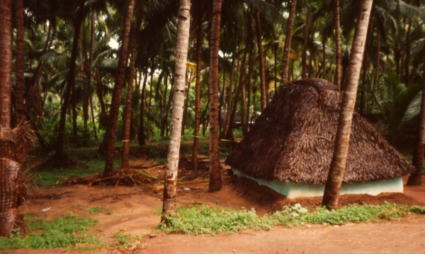 Typowa zabudowa wyspy Oroluk